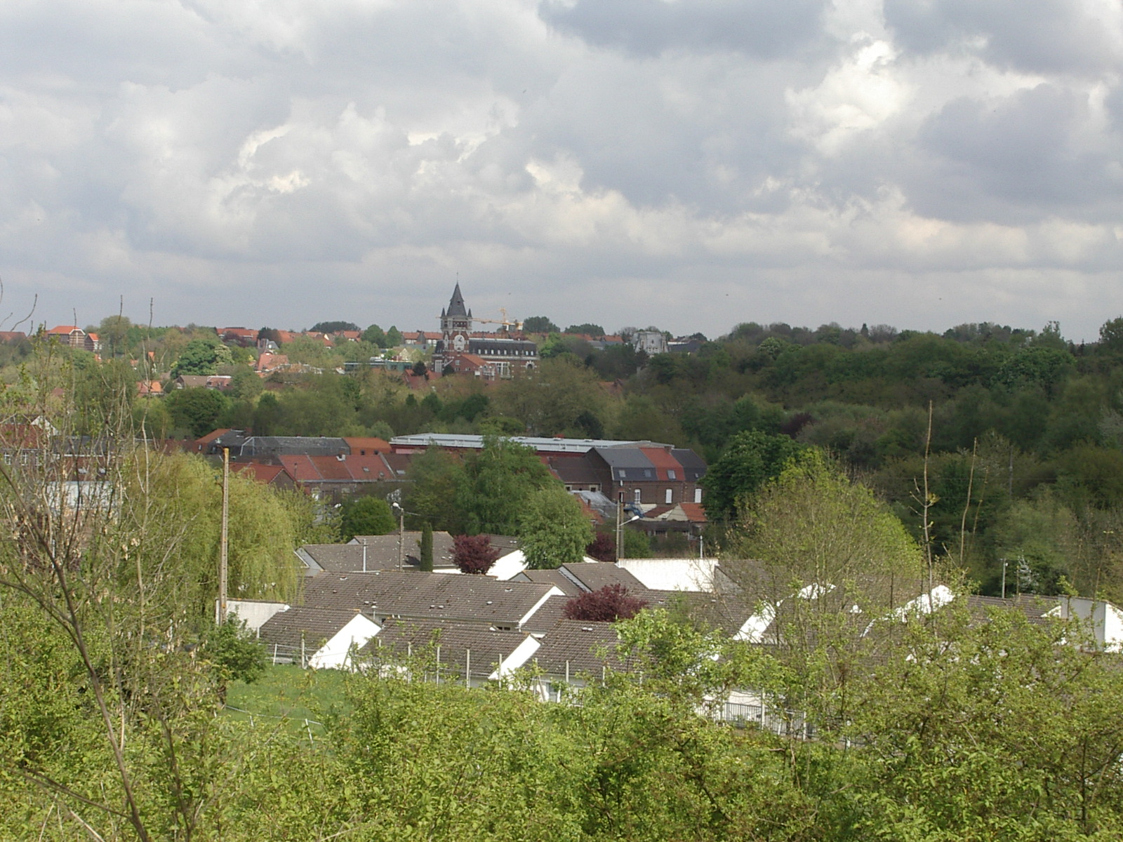 Bruay-la-Buissière (Pas-de-Calais, France)